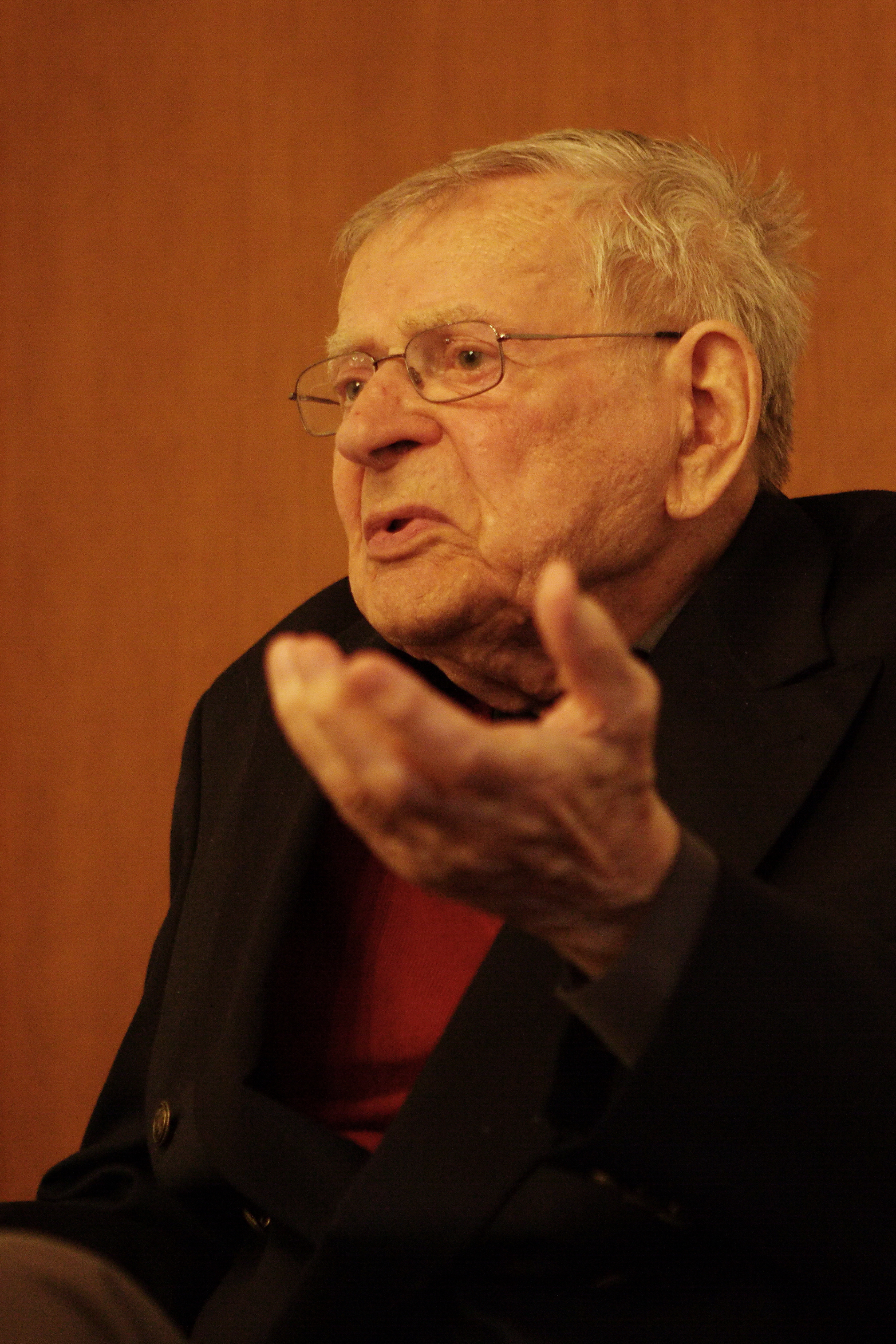 Herec Jan Skopeček, Trhový Štěpánov, 2013. Foto: Vít Švajcr Dobré světlo.com.